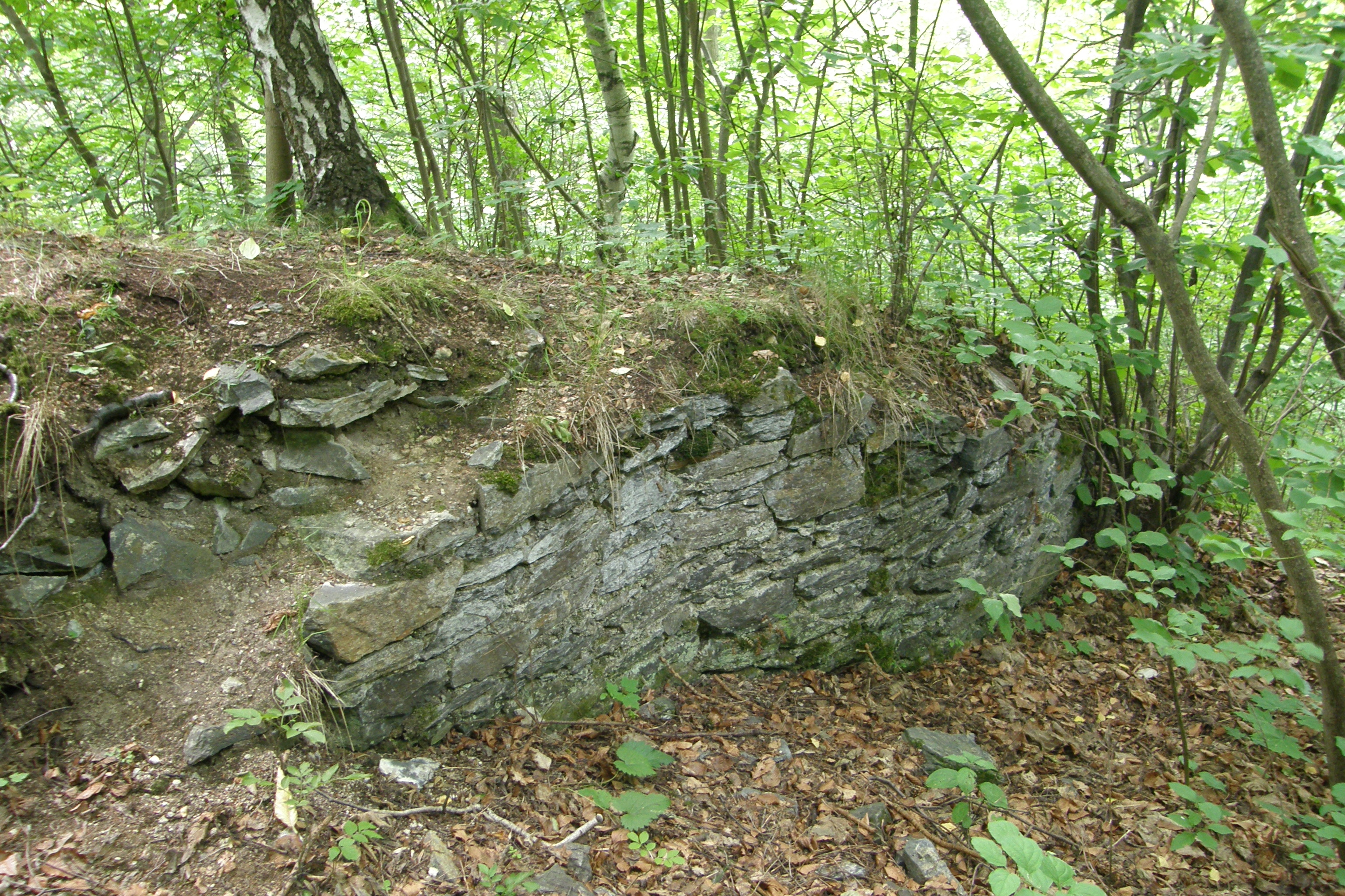 Ruiny hradu Louka